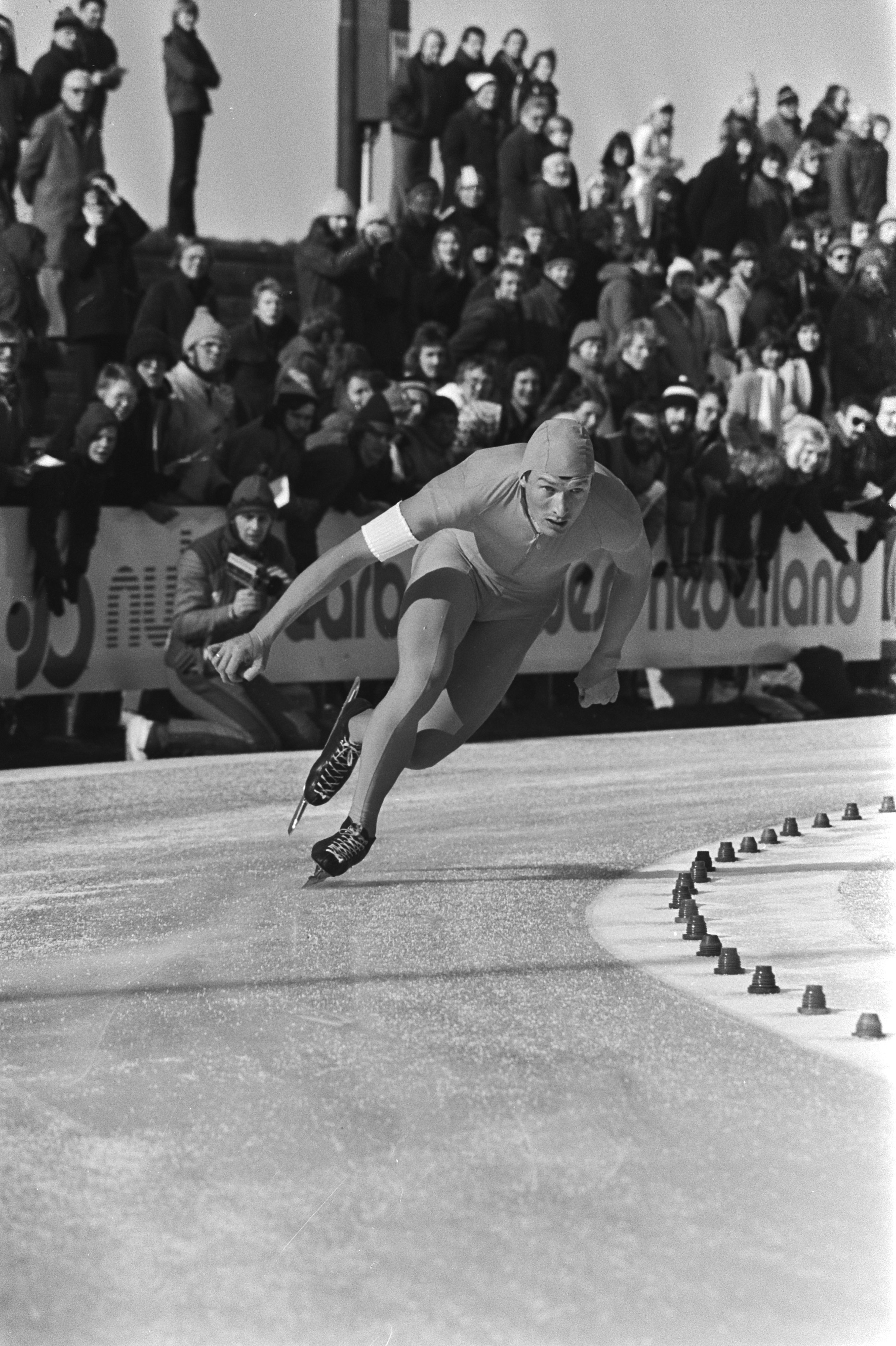 Collectie / Archief : Fotocollectie Anefo Reportage / Serie : Wereldkampioenschap schaatssprint in Alkmaar Beschrijving : Schaatser Jos Valentijn in actie Datum : 26 februari 1977 Locatie : Alkmaar, Noord-Holland Trefwoorden : schaatsers, sport, wereldkampioenschappen Persoonsnaam : Valentijn, Jos Fotograaf : Verhoeff, Bert / Anefo Auteursrechthebbende : Nationaal Archief Materiaalsoort : Negatief (zwart/wit) Nummer archiefinventaris : bekijk toegang 2.24.01.05 Bestanddeelnummer : 929-0478